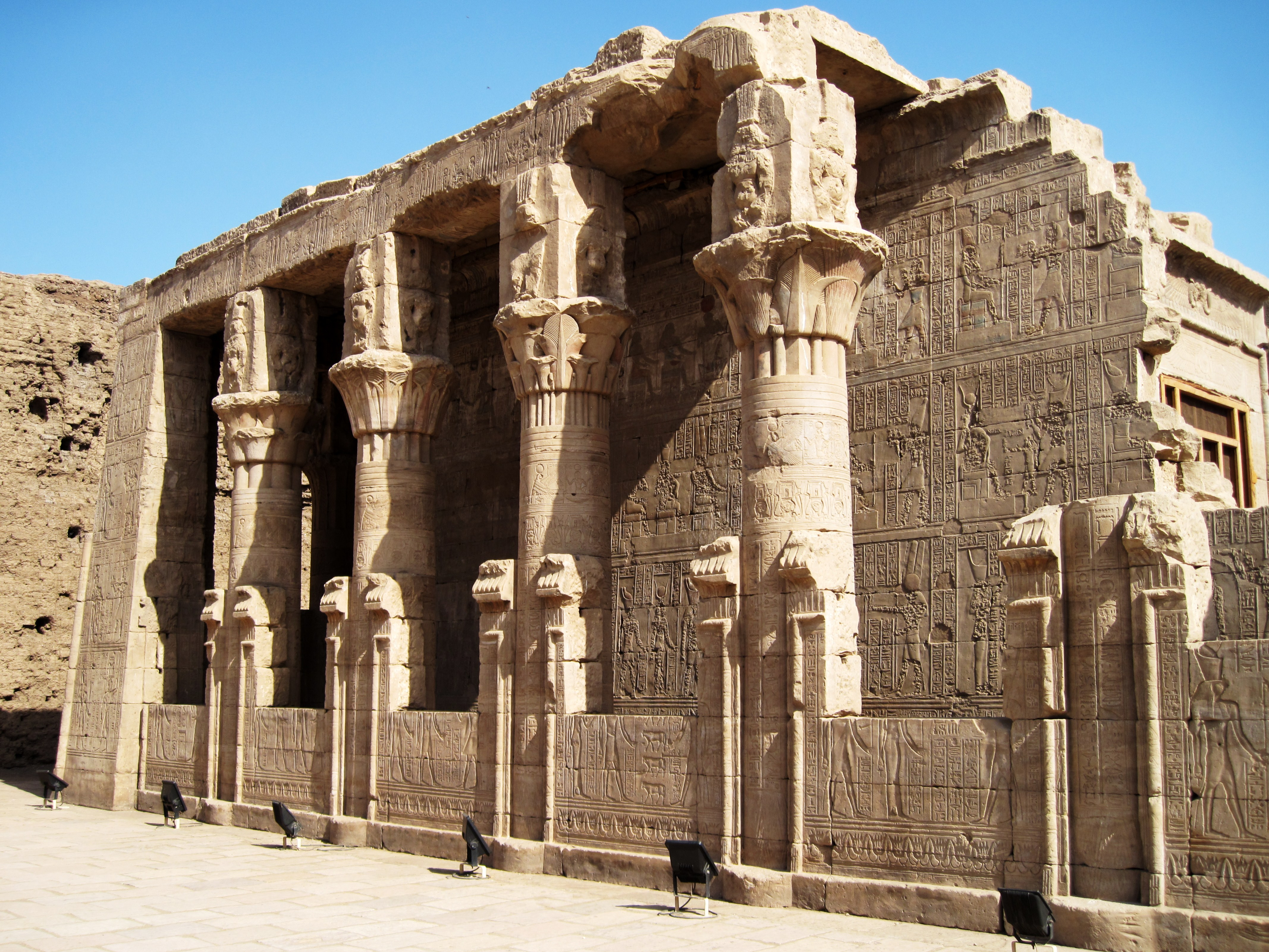 Mammisi vor dem Tempel von Edfu, Ägypten